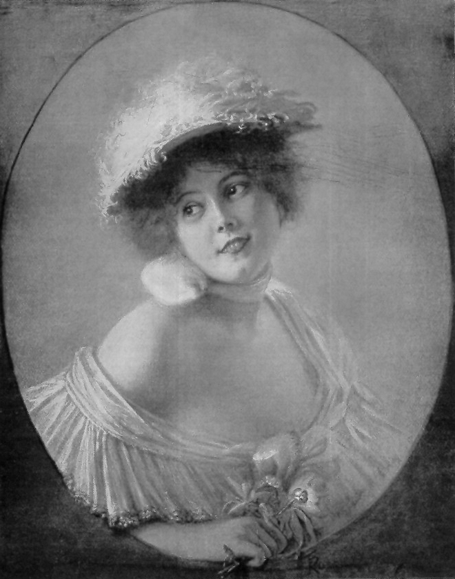 Kokett Gemälde von Franz Ruß (vermutl. letztes Drittel des 19. Jahrhunderts)